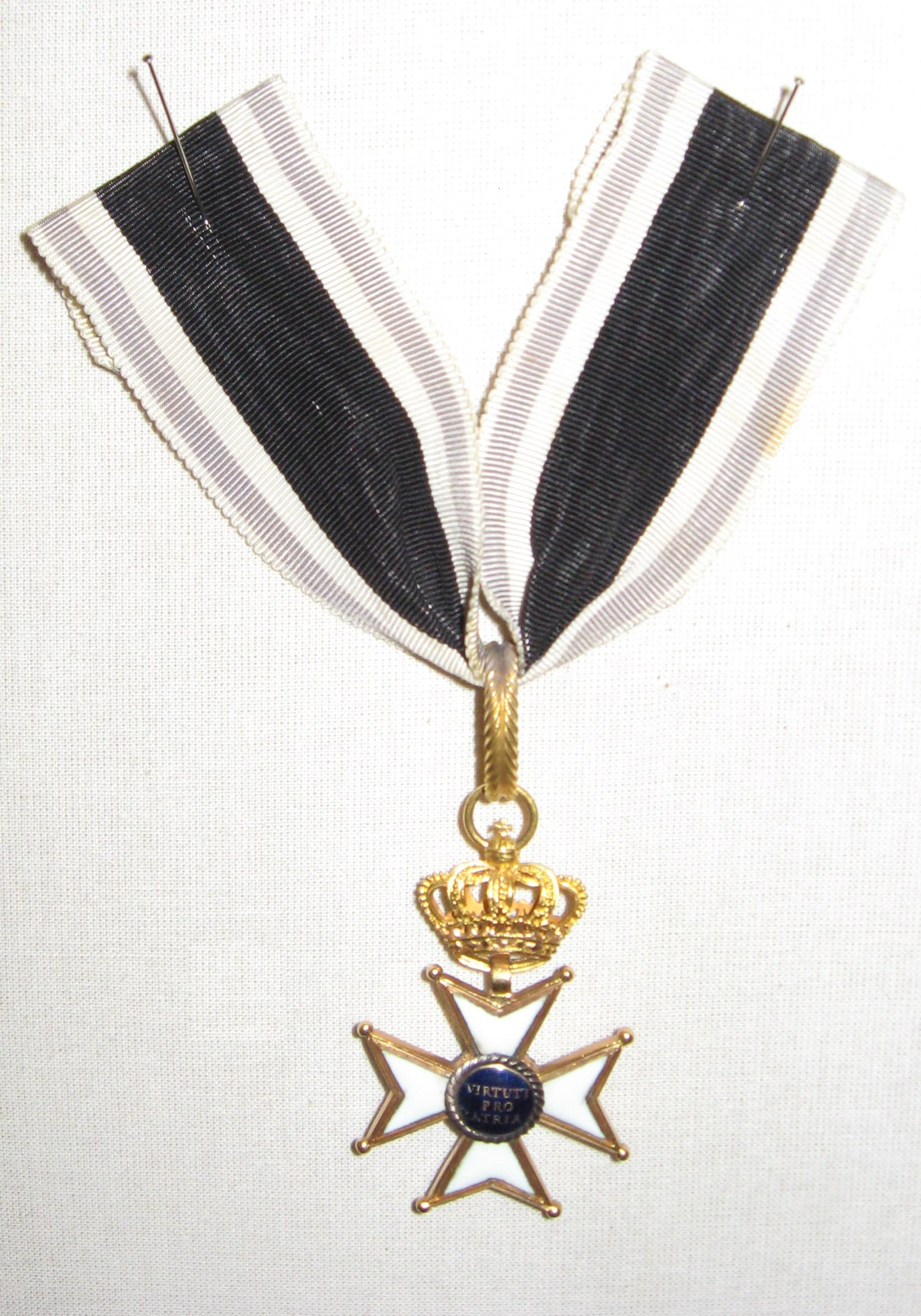 Militär-Max-Joseph-Orden: Kommandeurkreuz